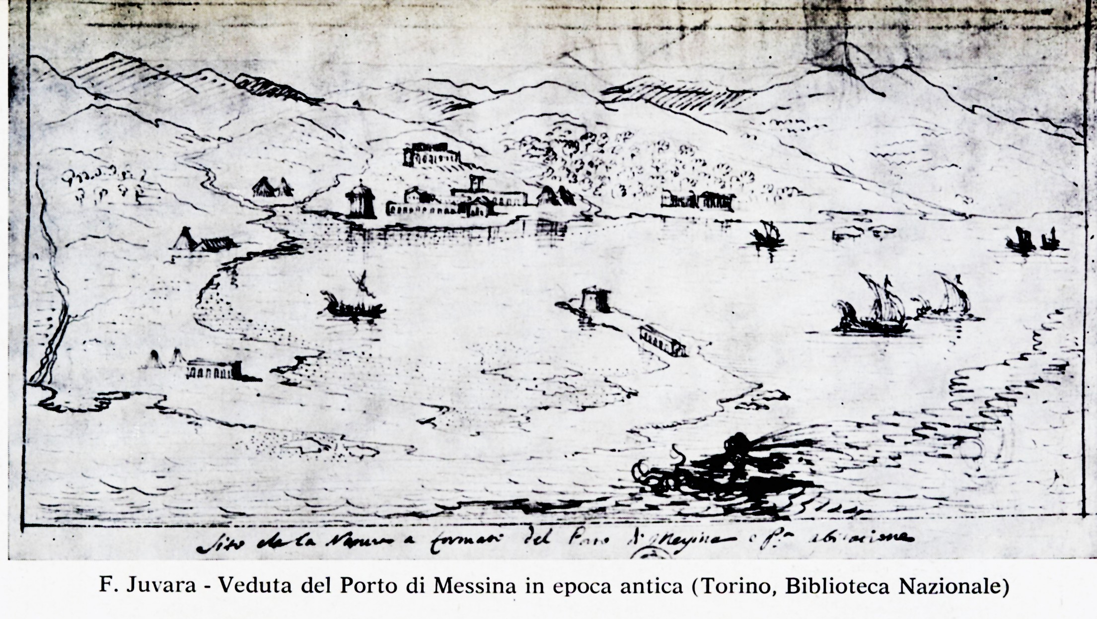 Filippo Juvarra, Veduta del porto di Messina. Torino, Biblioteca Nazionale.